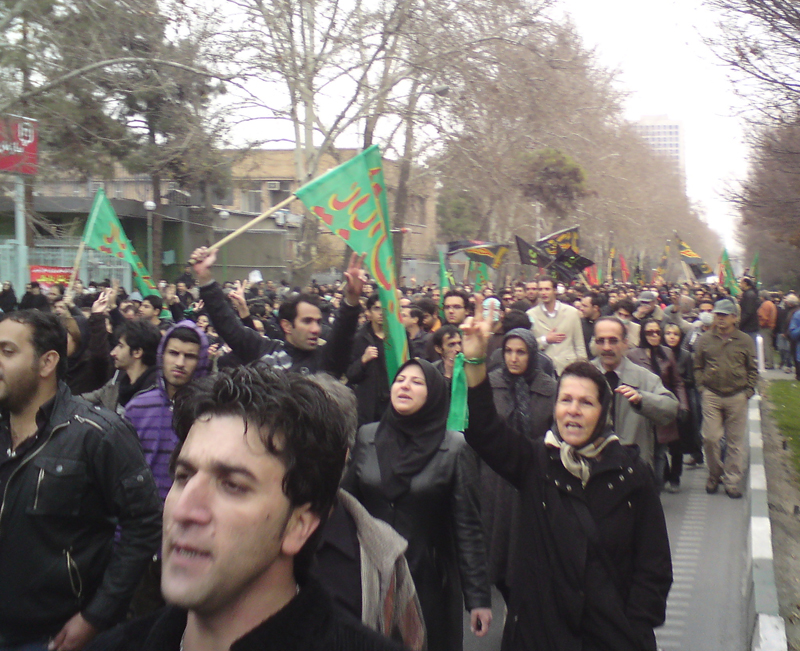 راهپیمایی جنبش سبز در روزعاشورا در بلوار کشاورز